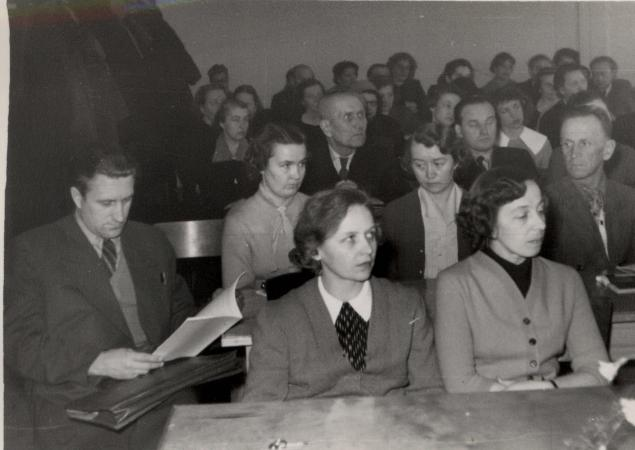 Vasakult Eduard Vääri, Helju Rajando, Ellen Uuspõld